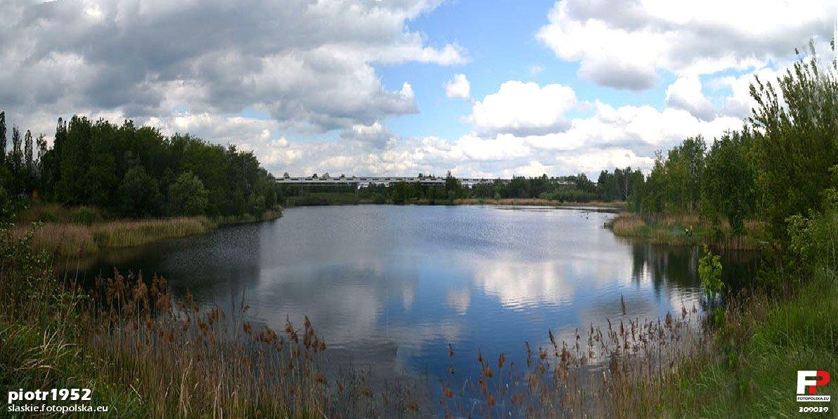 Staw po byłej cegielni, raj dla wędkarzy bez zezwolenia na połowy.